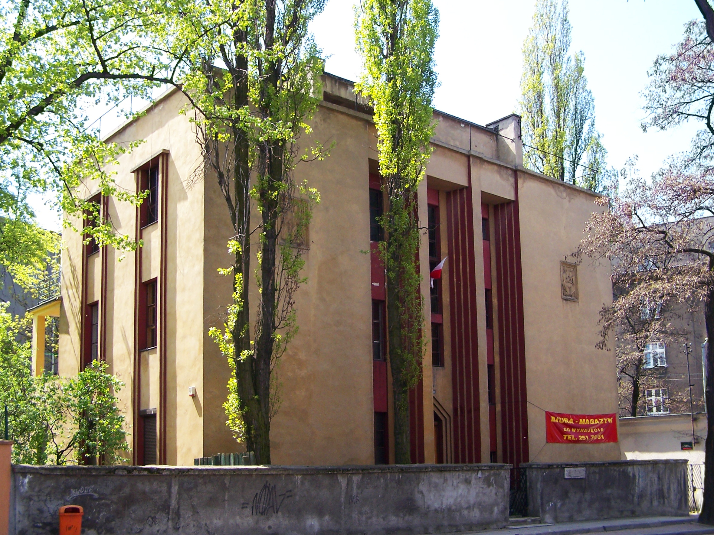 Willa Tadeusza Michejdy przy ul. Poniatowskiego w Katowicach. Zaprojektowana przez niego samego w 1922 r., a wybudowana w 1929 r.